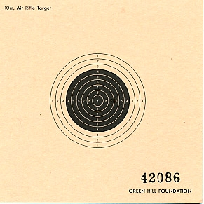 ko:10미터 공기소총 경기용 종이 표적